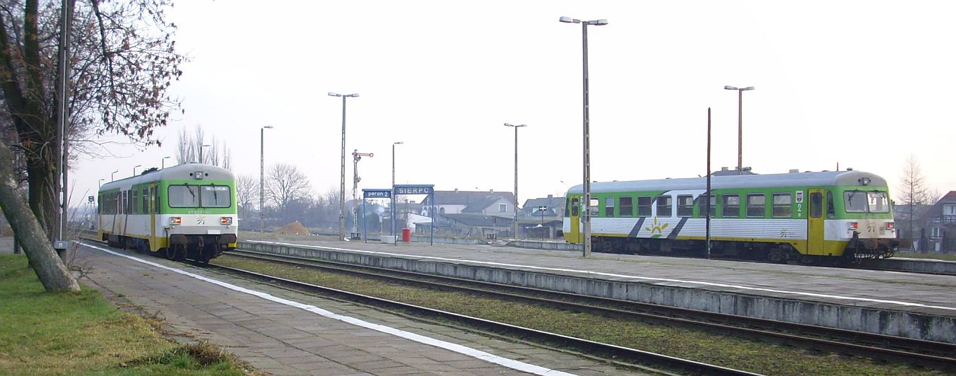 VT627-005 i VT627-101 na stacji w Sierpcu.